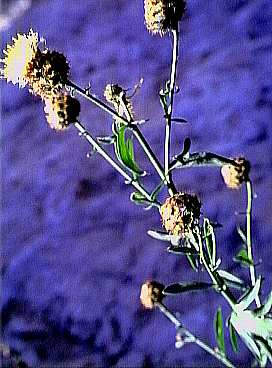 Sicilian botanical endemisms Centaurea tauromenitana